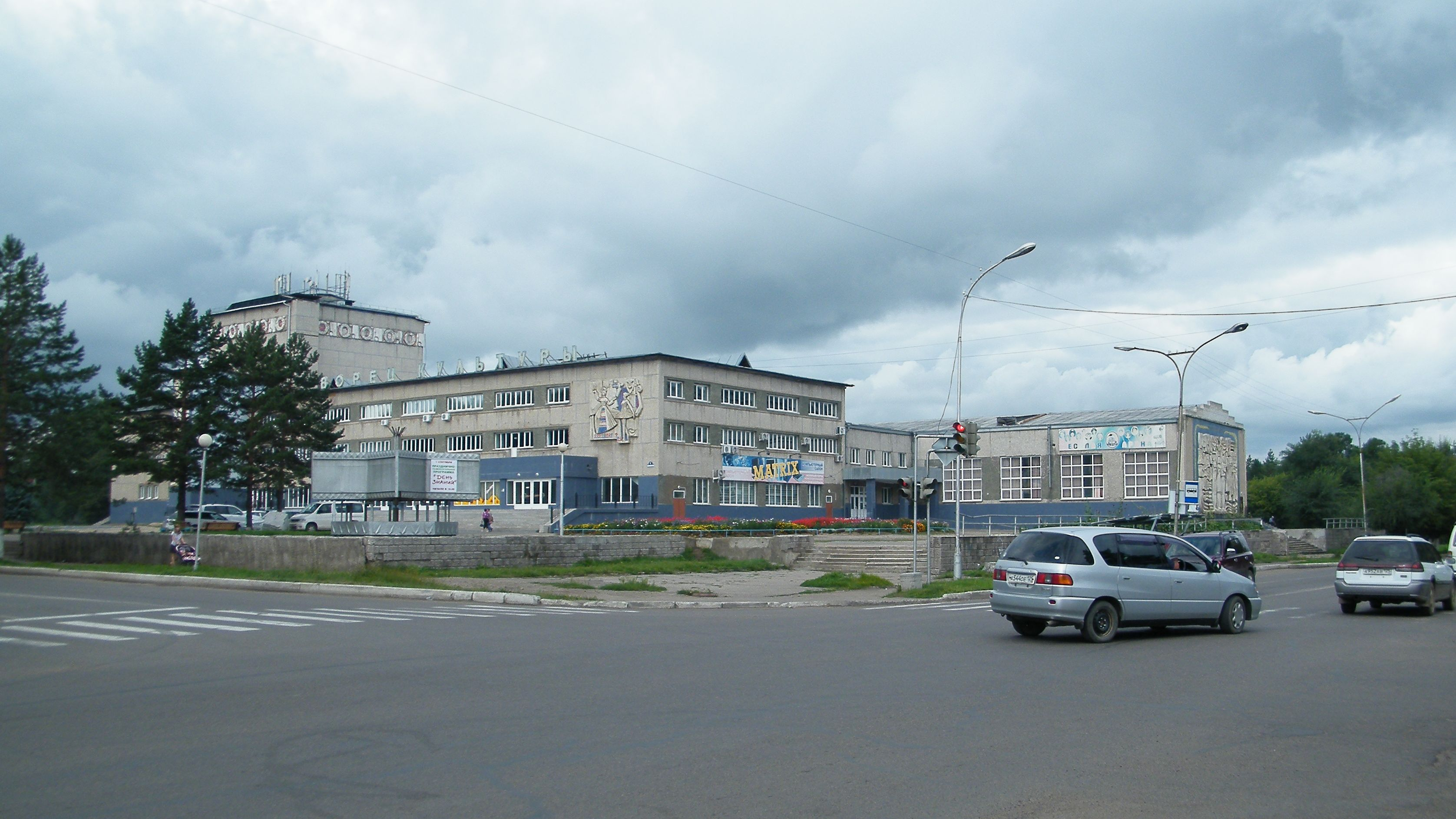 Дворец культуры завода Прогресс, город Арсеньев